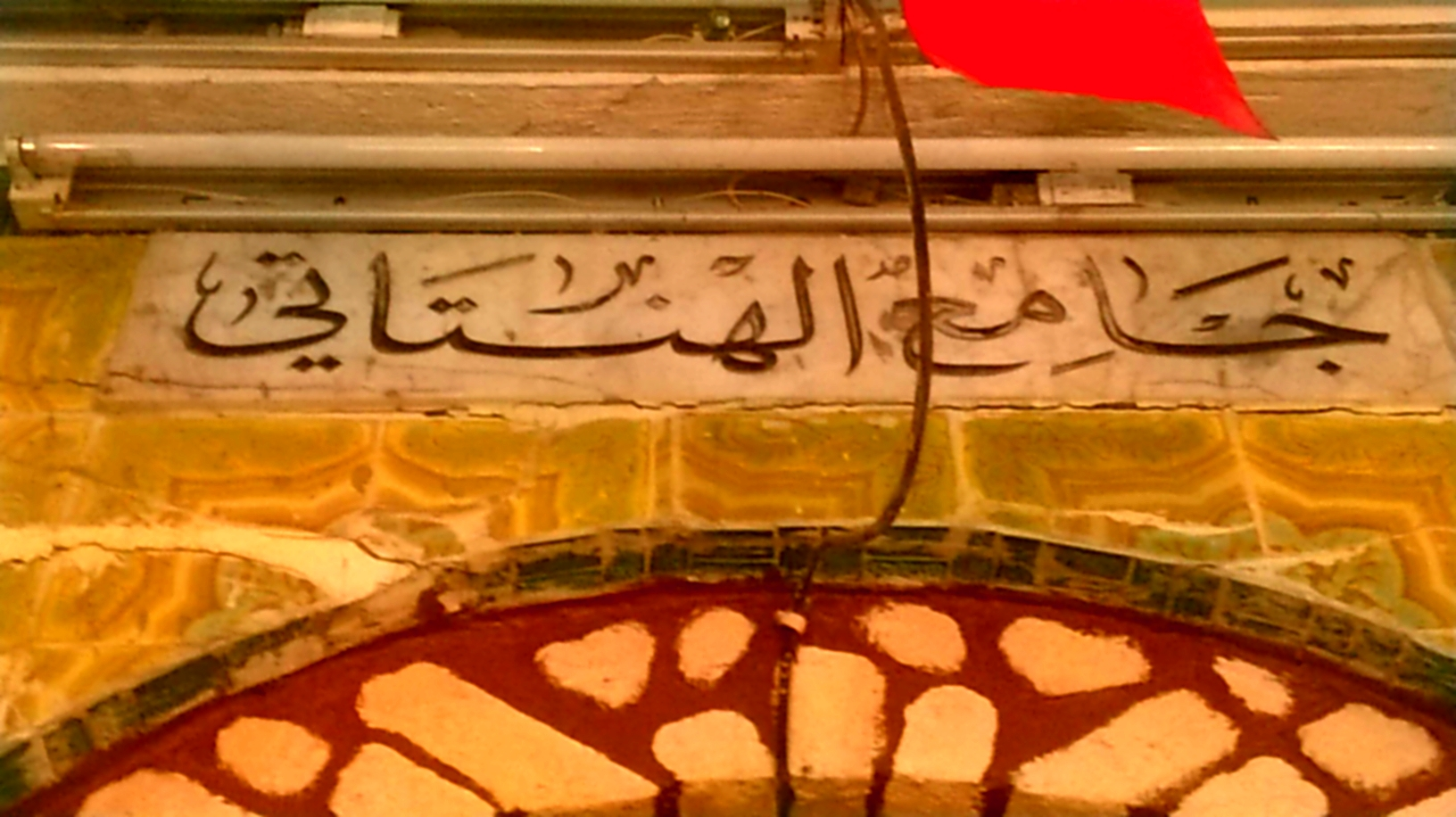 La médina de Tunis مدينة تونس العتيقة